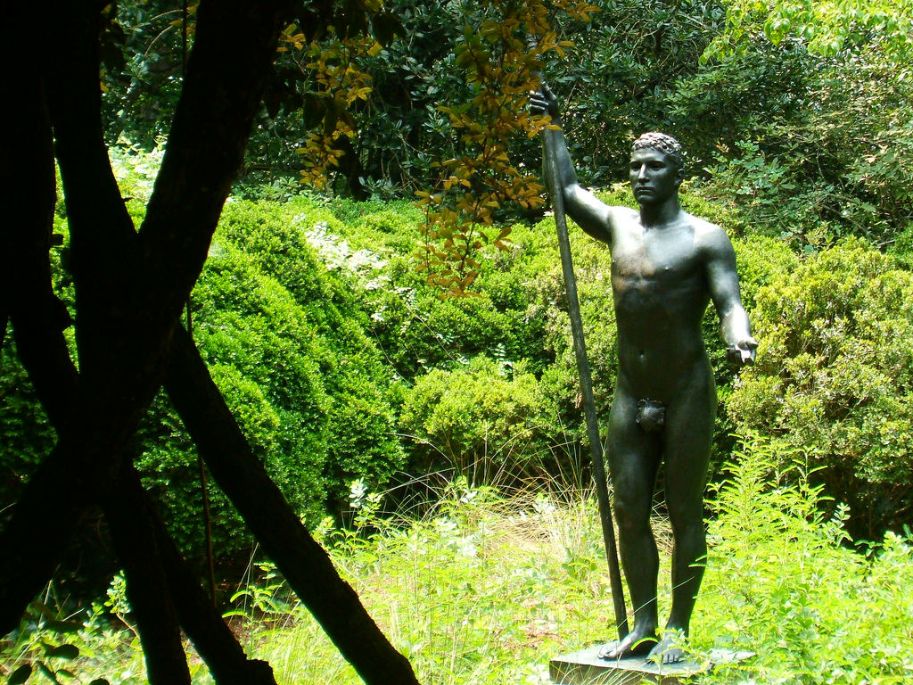 Brookgreen Gardens, sculpture garden: Athlete by Rudulph Evans, 1915.